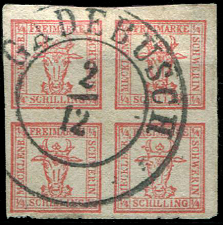 Квартблок из первых почтовых марок Мекленбург-Шверина